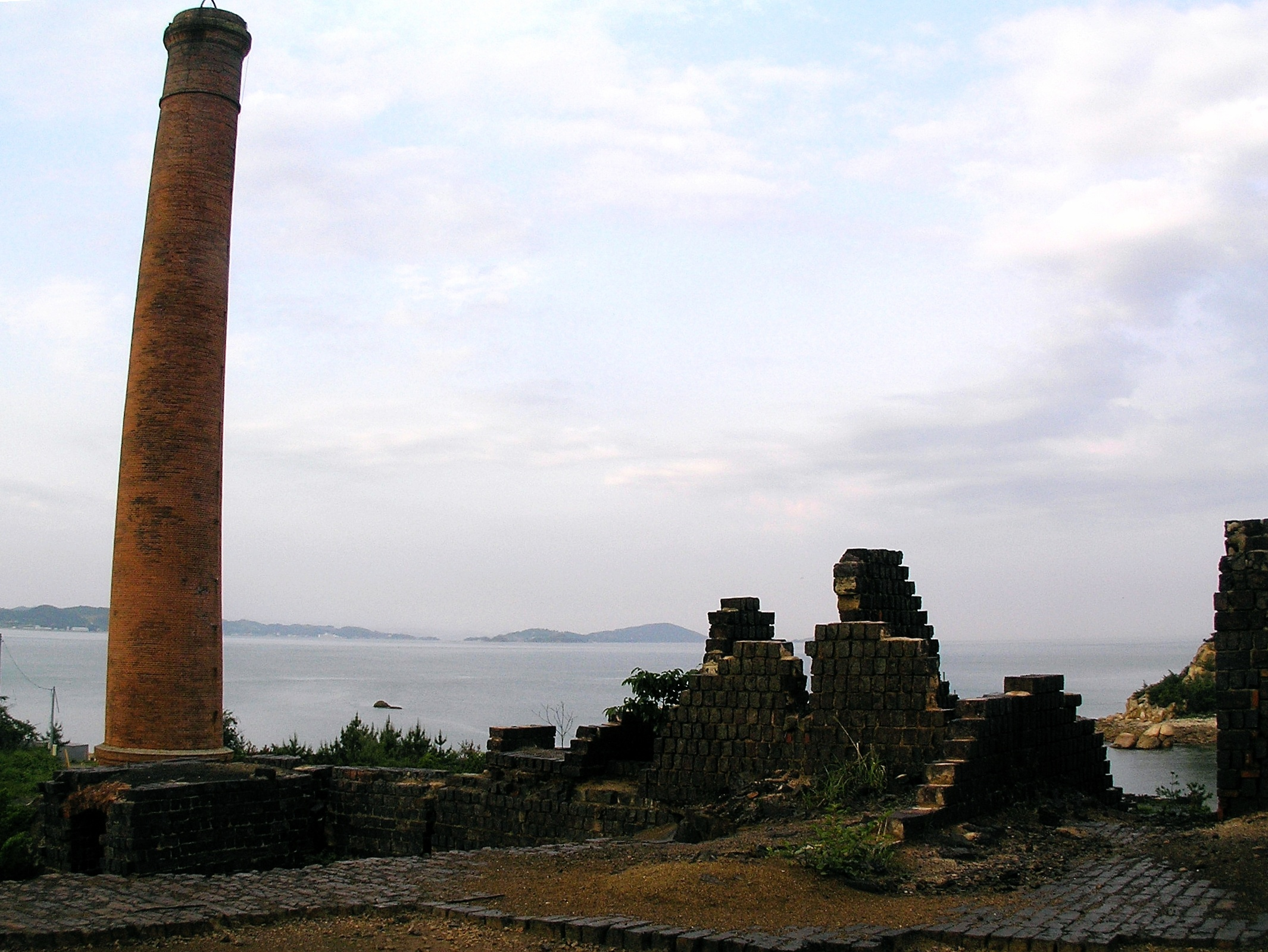 2004-05-22 Inujima,犬島